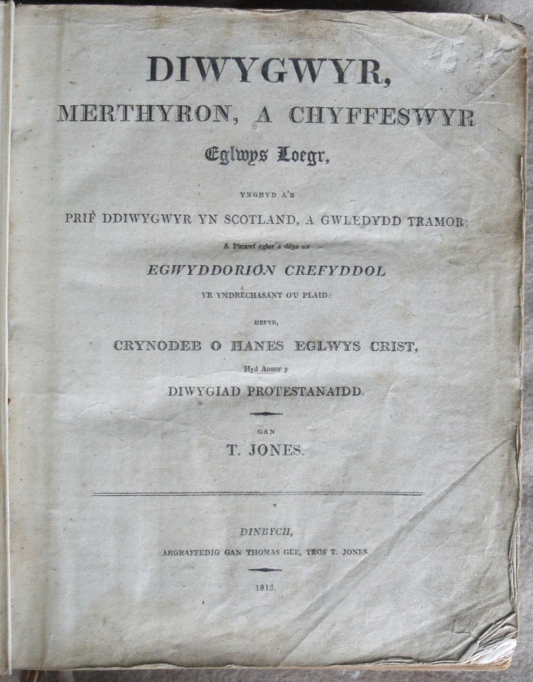 Wynebddalen Hanes y Merthyron (1813) gan Thomas Jones